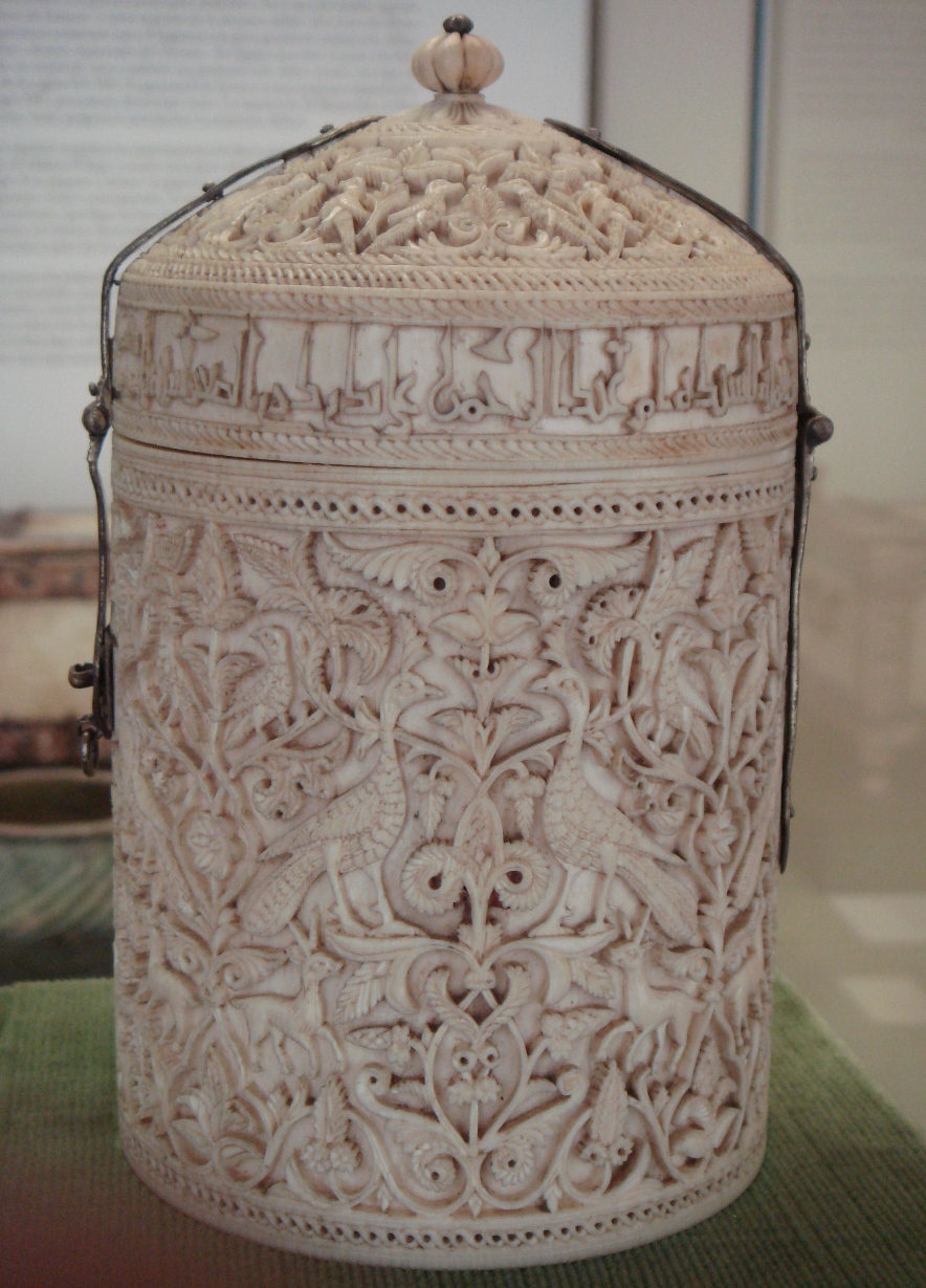 Bote de Zamora